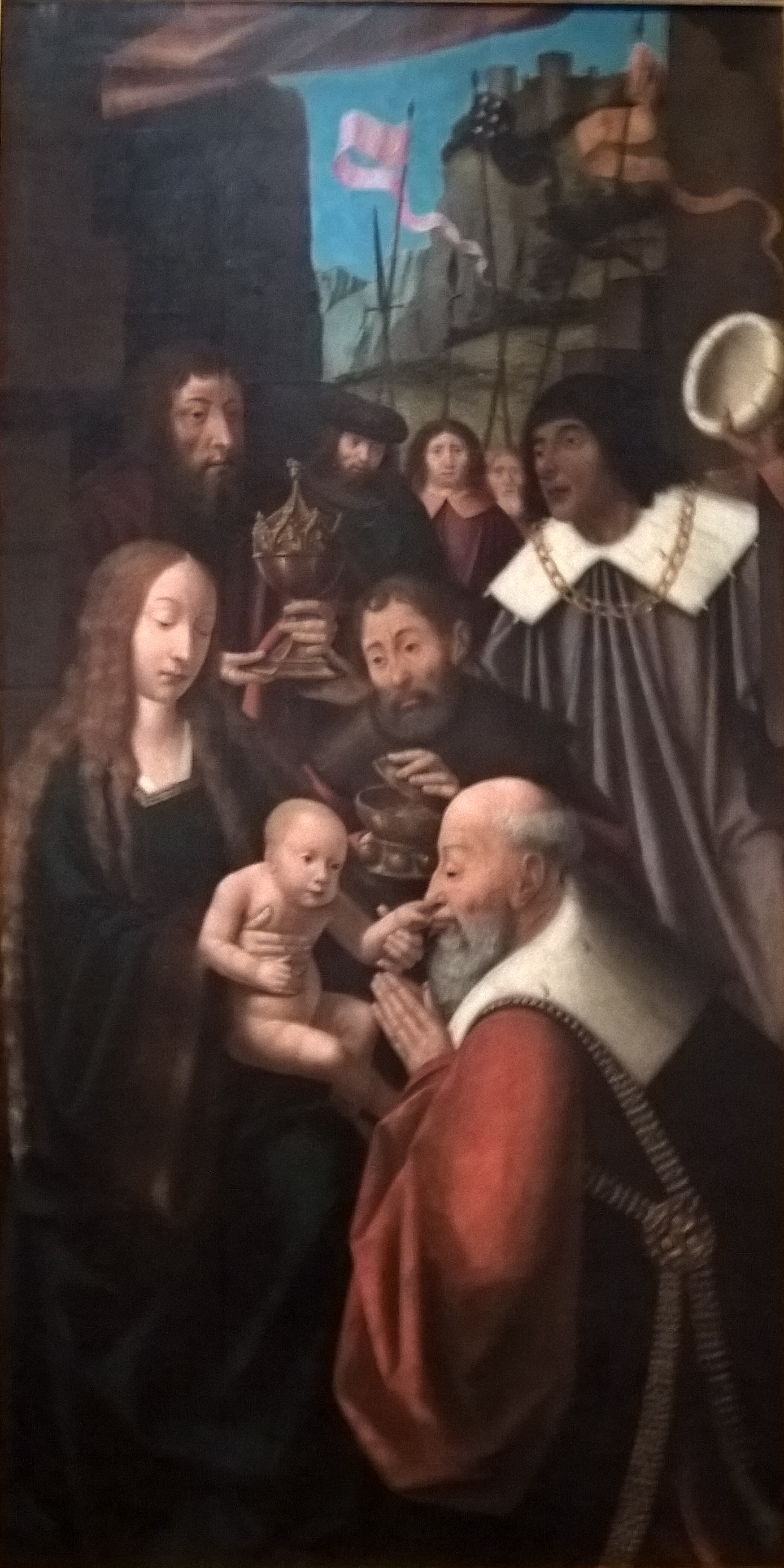 Adoração dos Reis Magos painel lateral do Tríptico da Capela dos Reis Magos, da Igreja Matriz da Ribeira Brava, na Madeira, atribuido ao Mestre do Tríptico de Morrison e actualmente no MASF